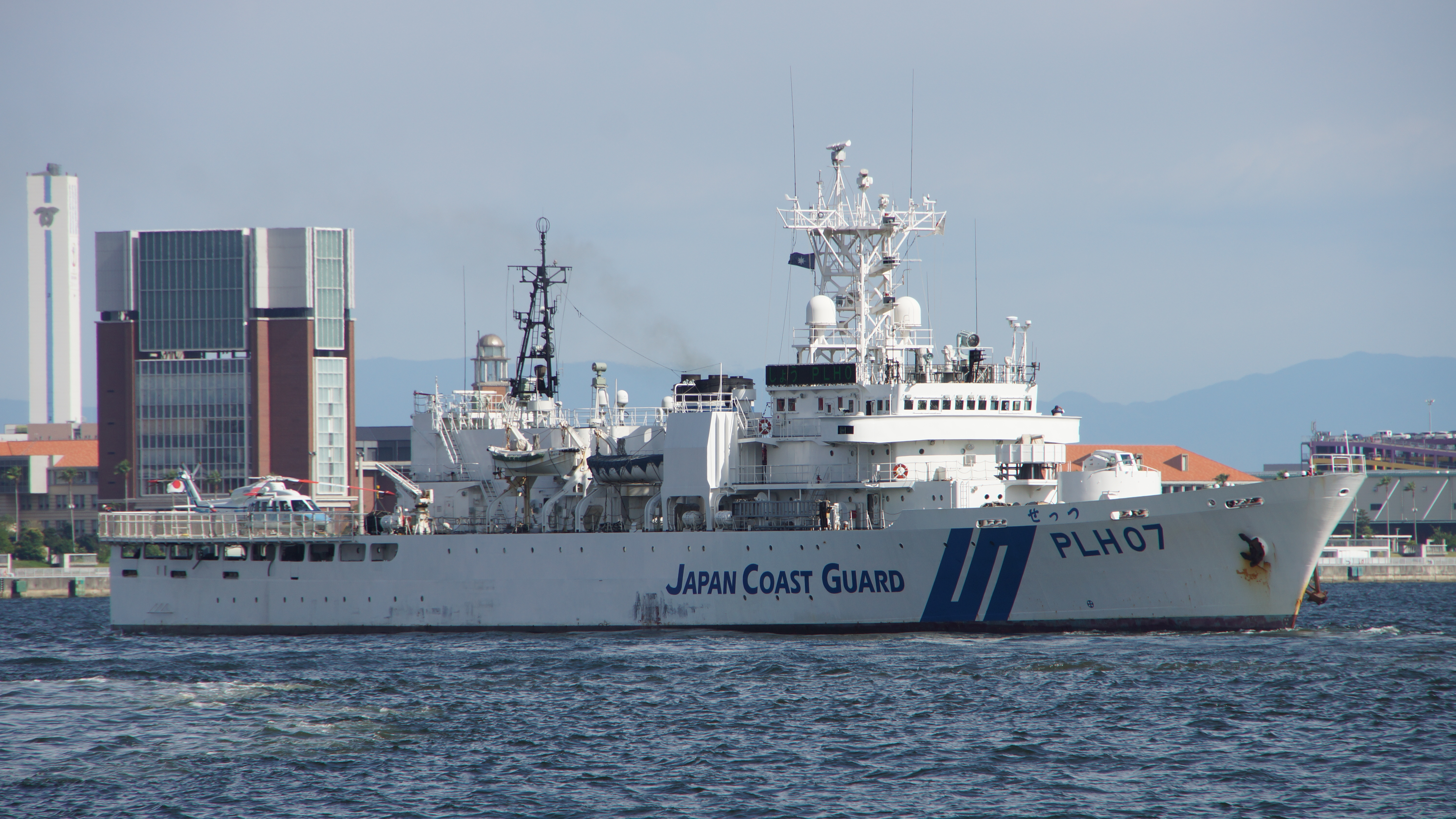 海上保安庁 ヘリコプター1機搭載型巡視船せっつ（PLH-07） 右舷前面。2017年7月22日 神戸港にて。